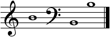 Nuty H na pięciolini